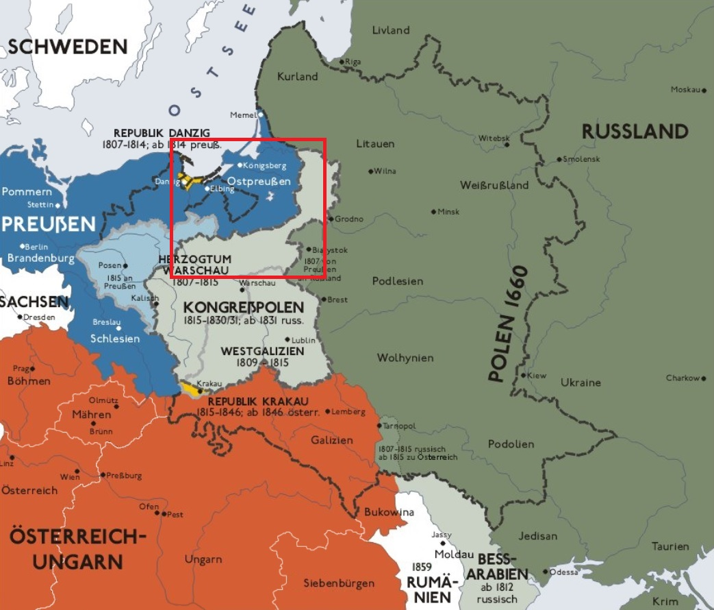 東プロイセン戦域図